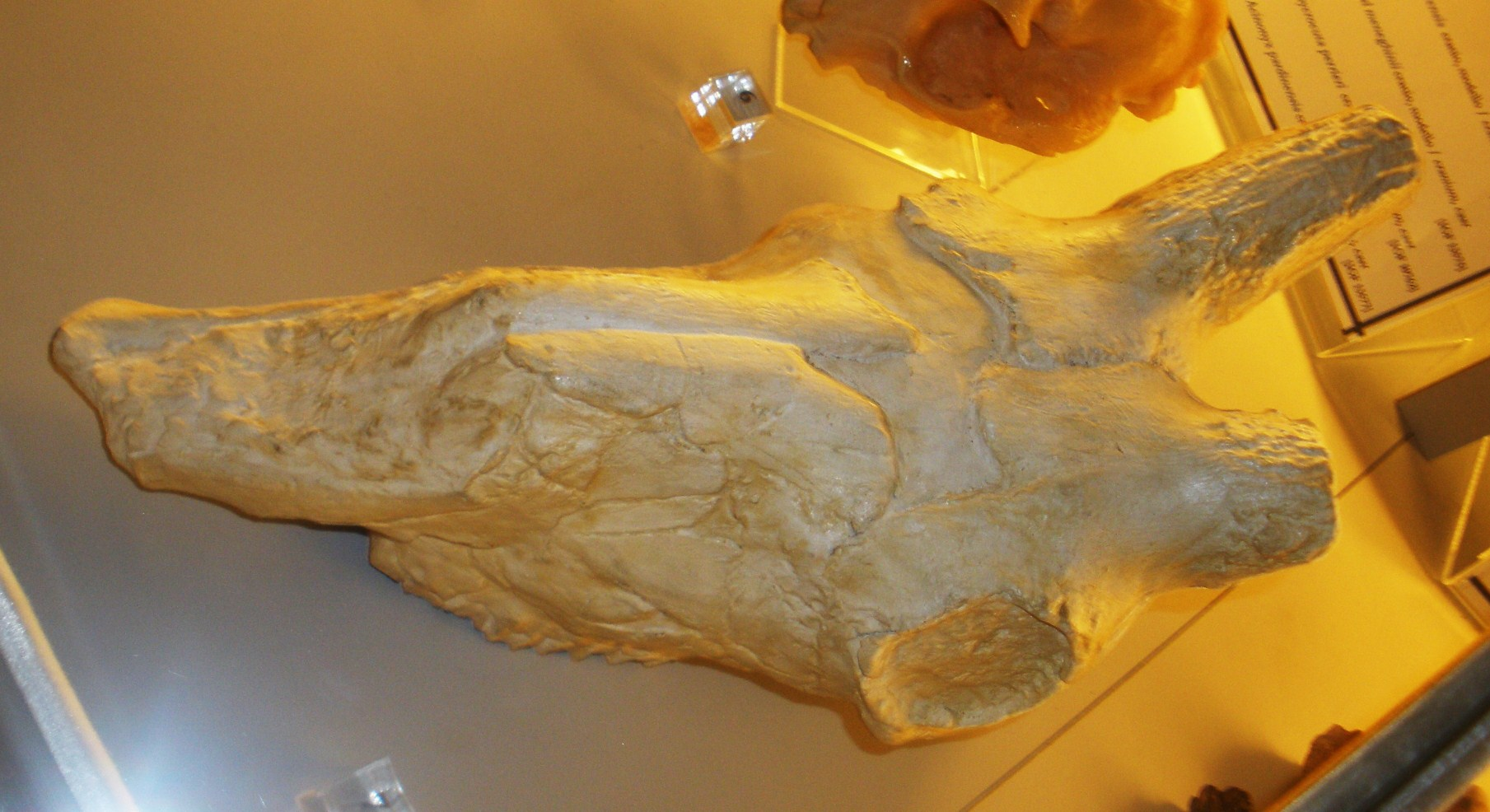 Fossil of Gallogoral, an extinct mammal - Took the picture at Museo di Paleontologia di Firenze